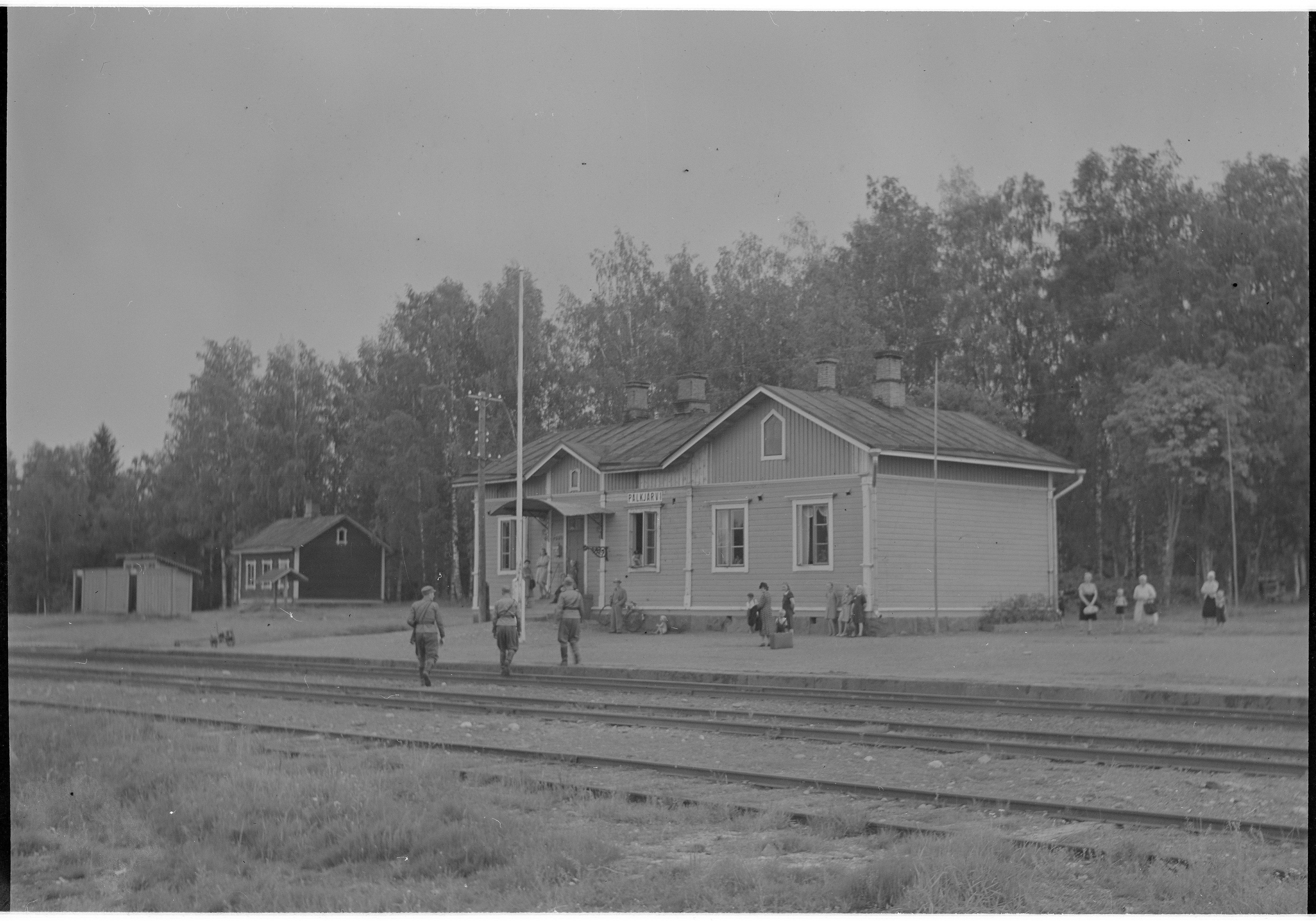 Пялькъярви, Июль 1943, T. Norjavirta